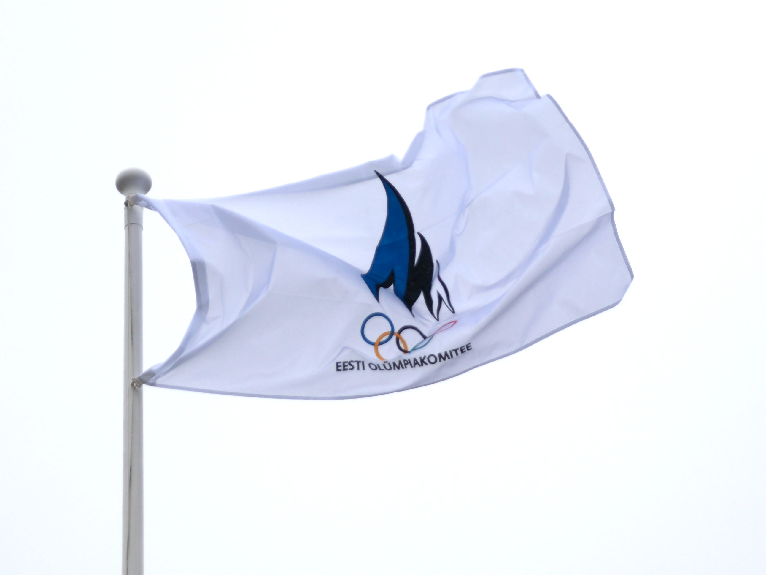 Eesti Olümpiakomitee lipp